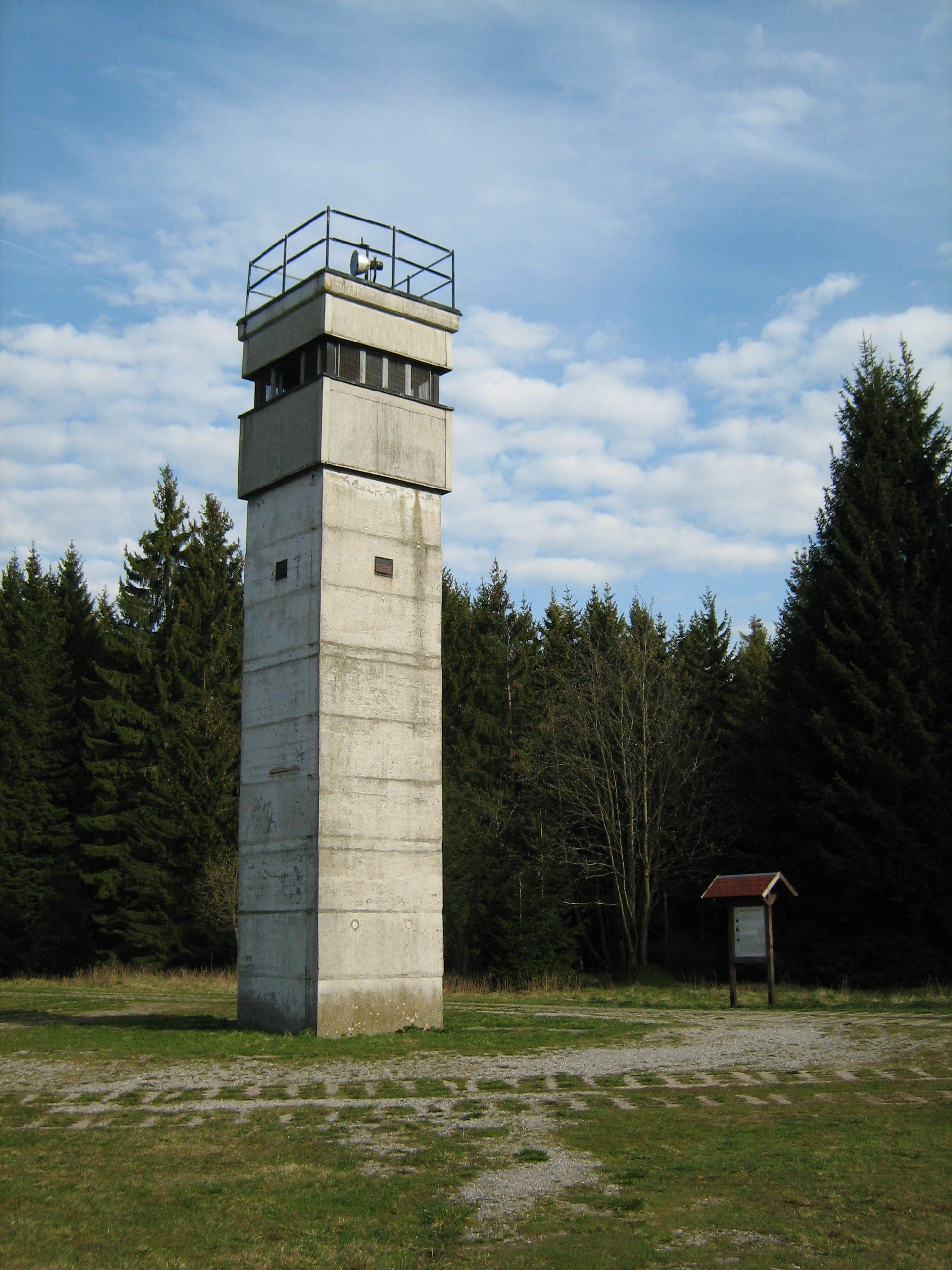 Sorge Dokumentationscenter: Vagttårn, 27. april 2012